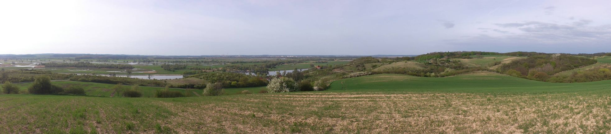 Panorama Doliny Dolnej Odry ze Wzgórz Krzymowskich w okolicach Zatoni Dolnej